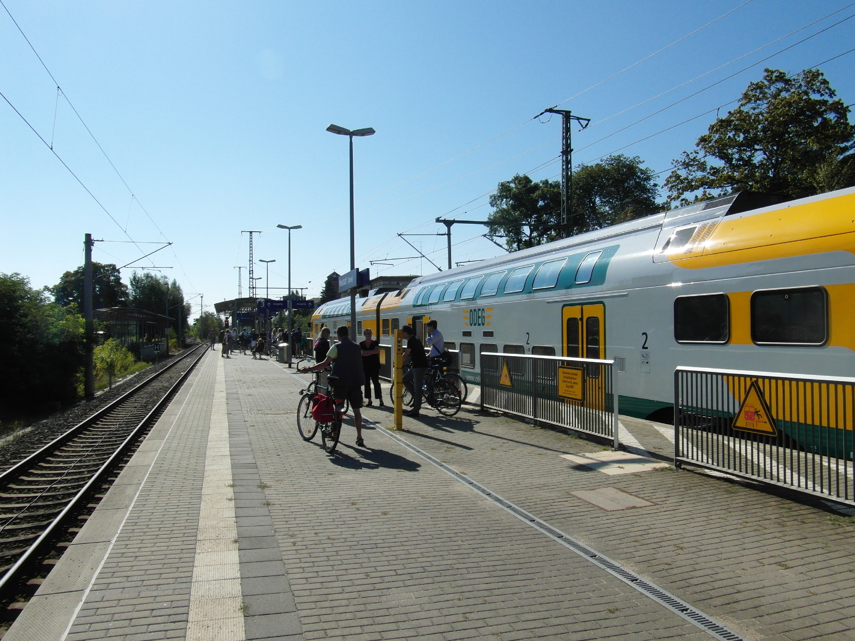 Bahnhof Neustadt (Dosse) im Landkreis Ostprignitz-Ruppin im Land Brandenburg